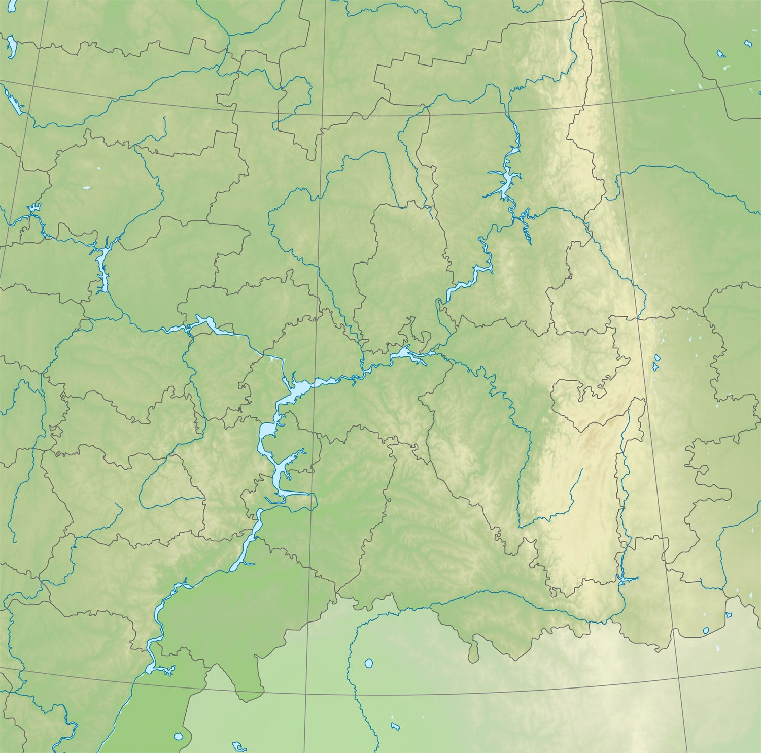 Физическая карта Приволжского федерального округа Проекция — коническая равнопромежуточная. первая стандартная параллель — 52°00′с.ш. вторая стандартная параллель — 58°00′с.ш. средний меридиан — 52°00′в.д. Формулы расчёта координат: x = #expr: 50 + 440.7367655 * (1.659498624 - ( {2 }*pi / 180)) * sin(0.818777804 * ( {1 } - 52) * pi / 180) * 0.9885 y = #expr: 53.84615367 - 440.7367655 * (0.699567535 - (1.659498624 - ( {2 }*pi / 180)) * cos(0.818777804 * ( {1 } - 52) * pi / 180))